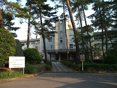 千葉県立東葛飾高等学校（正門から見た校舎）